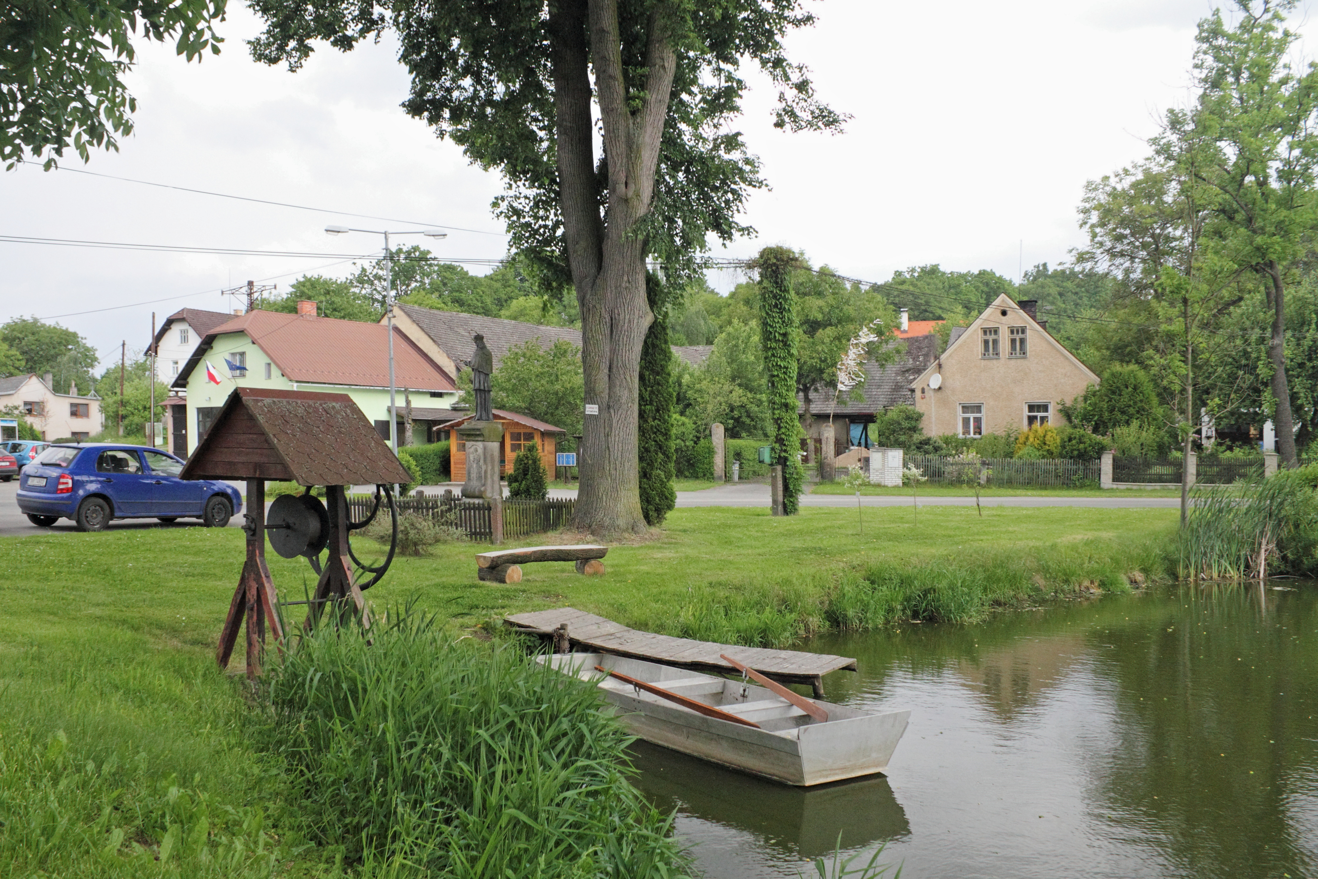 Sezemice v okrese Mladá Boleslav